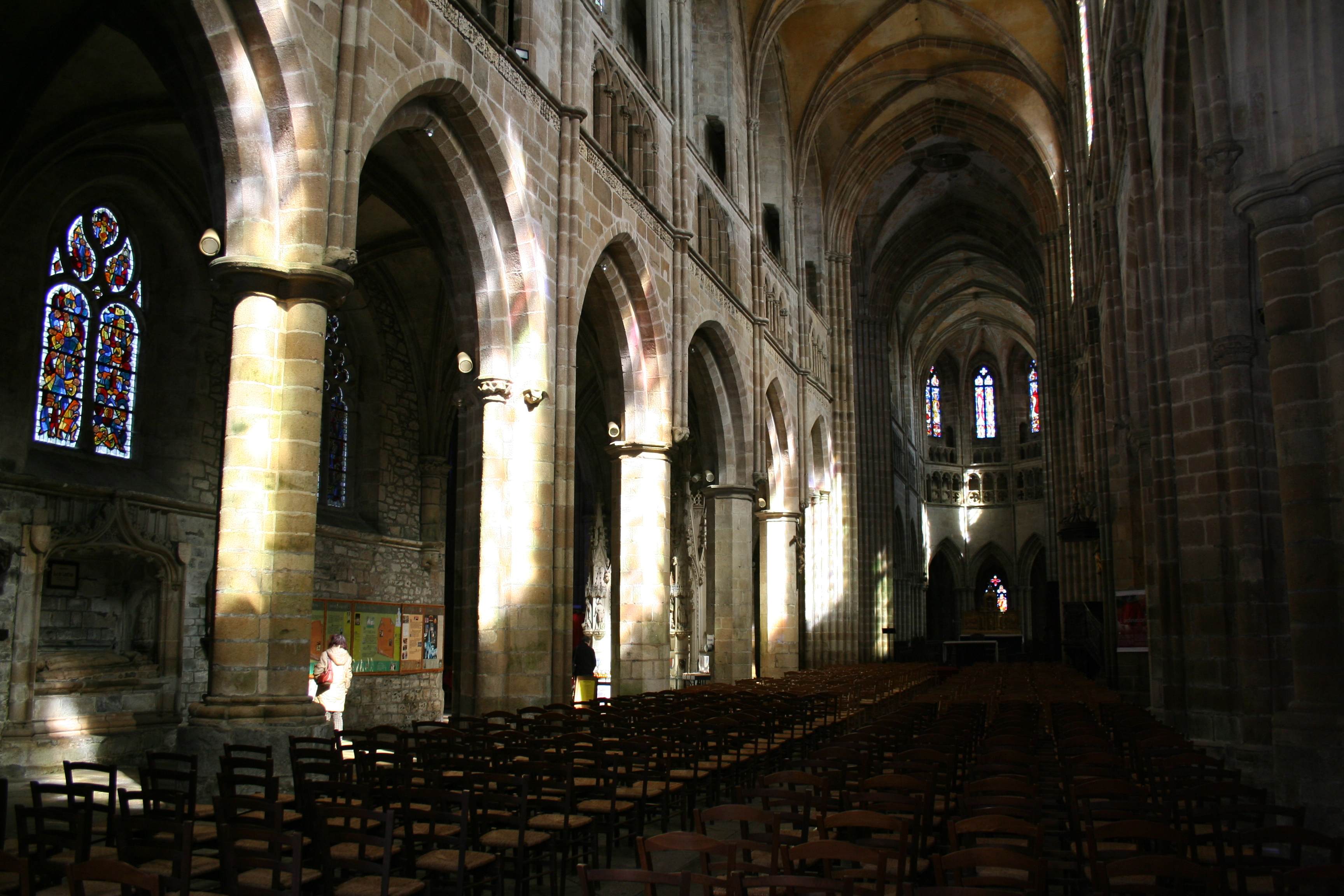 Cathédrale Saint-Tugdual de Tréguier - Tréguier - Côtes d'Armor - France .